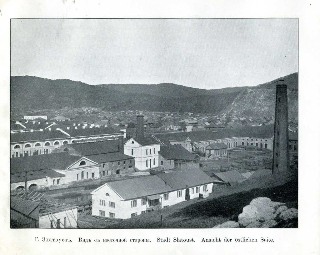 В.Л. Метенков Альбом "Виды Урала", с аннотацией на русском и немецком, 1900 г.